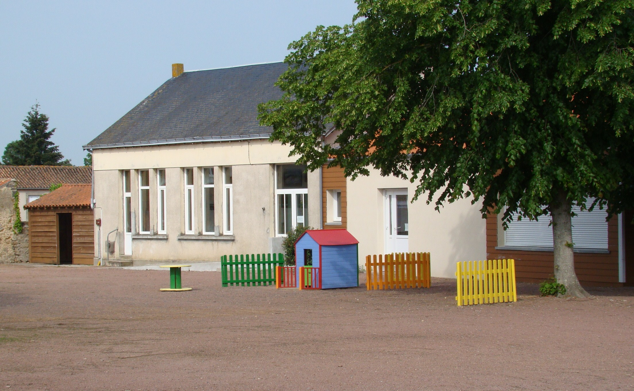 L'école privée Sainte-Bernadette à Noirterre (Deux-Sèvres - France)